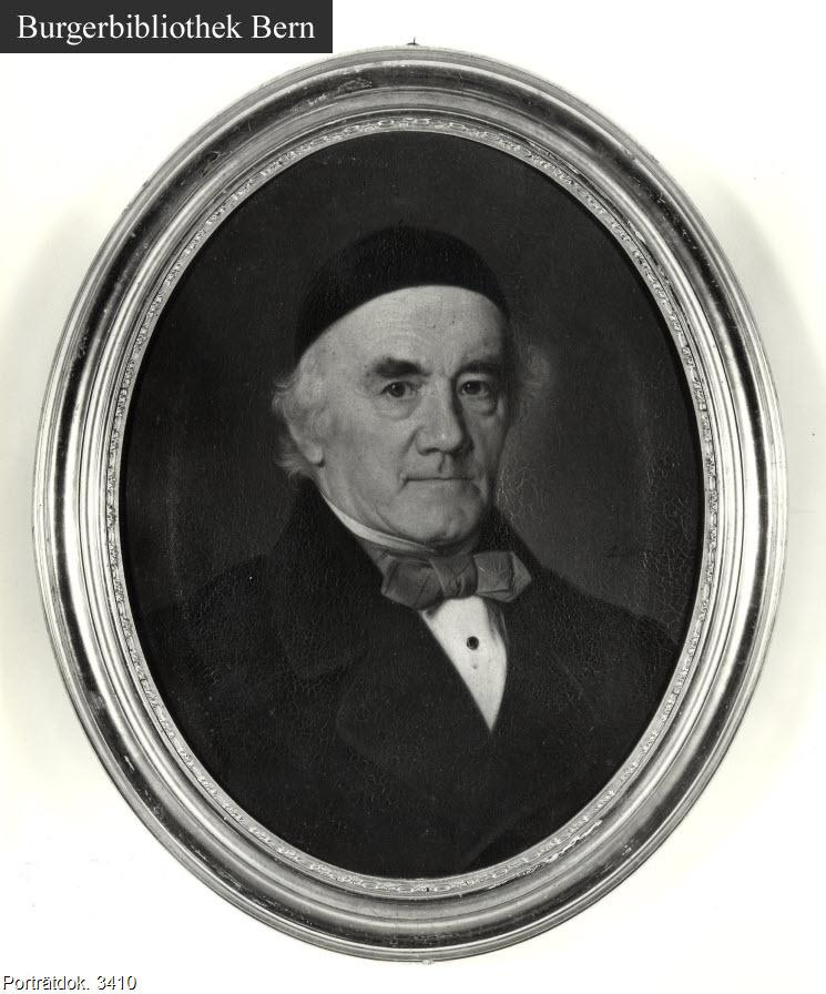 Daniel Friedrich Langhans, Münchenbuchsee BE, Schweiz: 1864